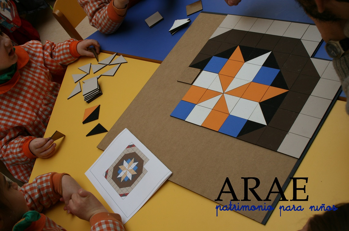 Taller educativo de ARAE Patrimonio sobre mosaicos Nolla